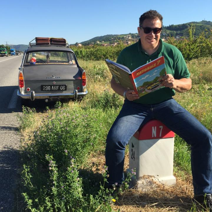 Thierry Dubois, assis sur une borne de la RN7, tient son livre ouvert derrière sa 404 Peugeot